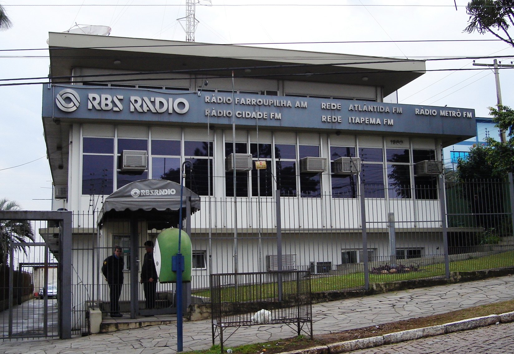 Sede da RBS Rádio, do Grupo RBS.